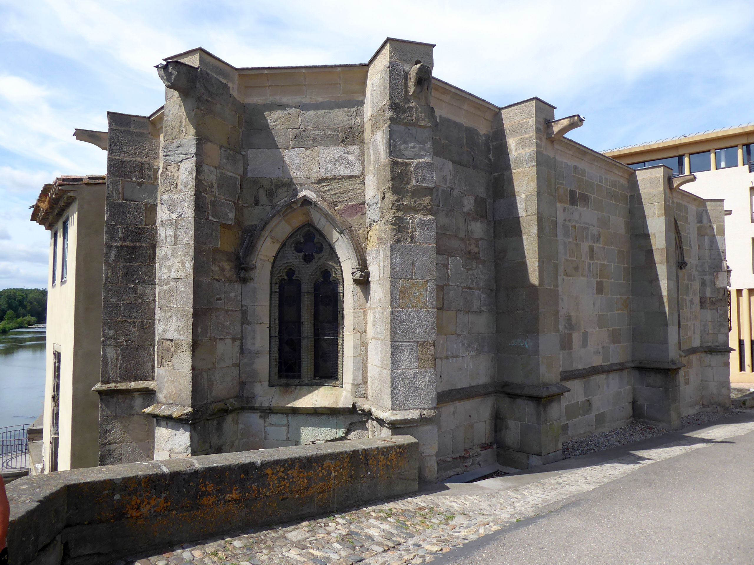 Chapelle Notre-Dame-de-Santé de Carcassonne